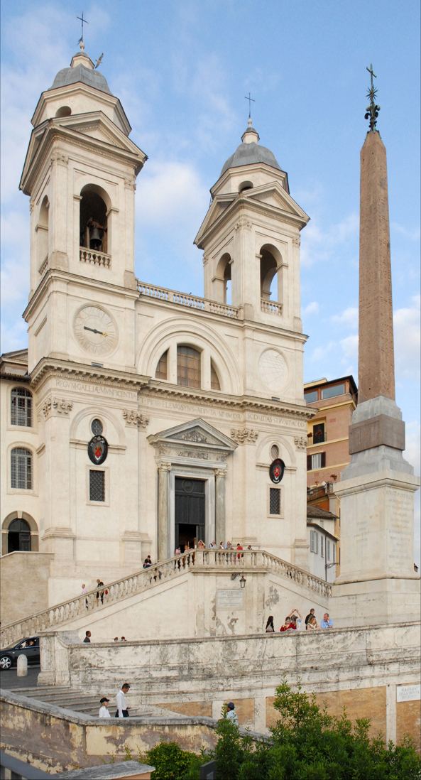 Façade de l'église de la Trinità dei Monti Cette église est reliée à la Piazza di Spagna par un célèbre escalier datant du XVIIIème siècle, le site est devenu un lieu touristique majeur de Rome. L'église, devant laquelle a été érigé un obélisque en 1789, est une fondation française, sa façade a été conçue par Carlo Maderno. Elle est proche de la Villa Médicis.